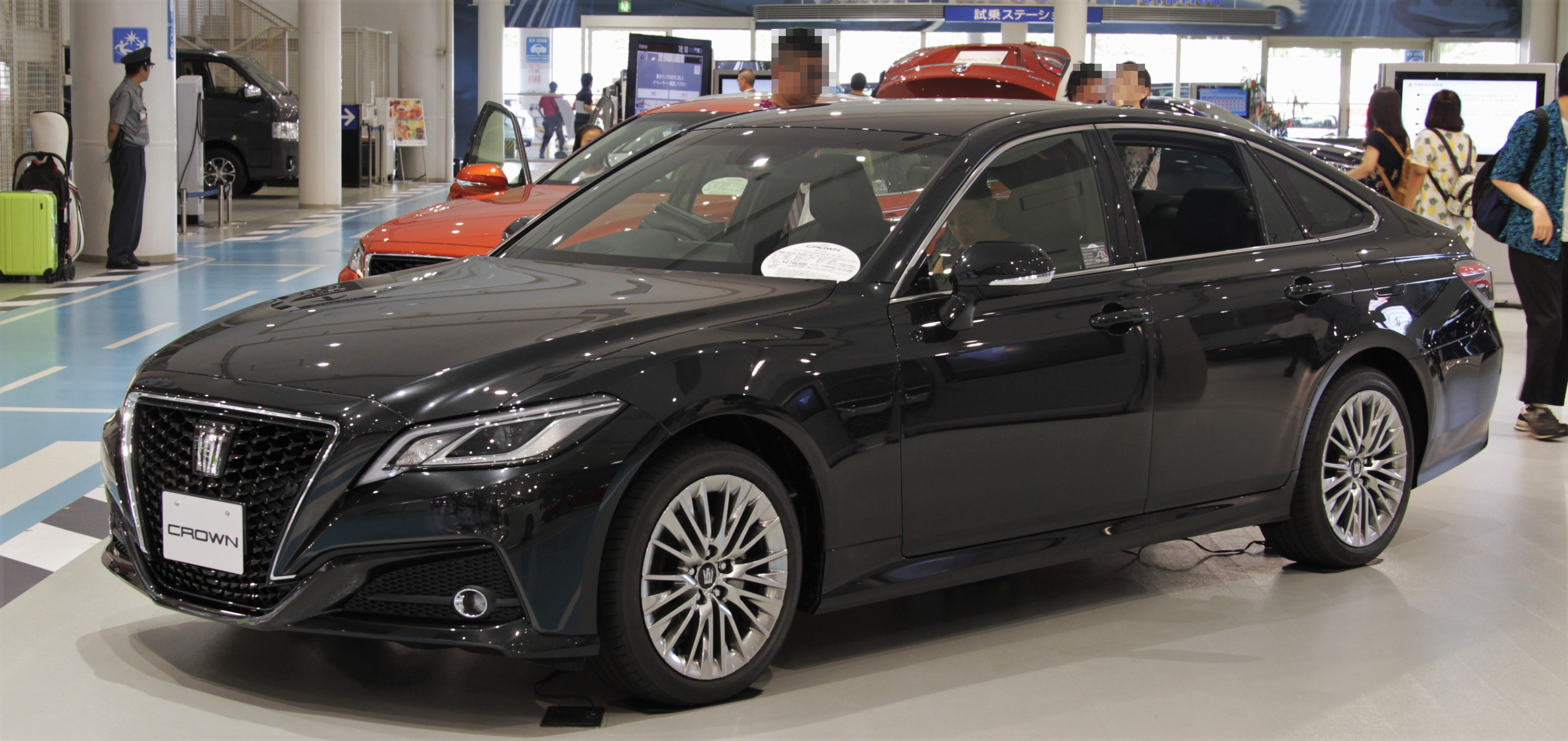 Toyota Crown (S220)